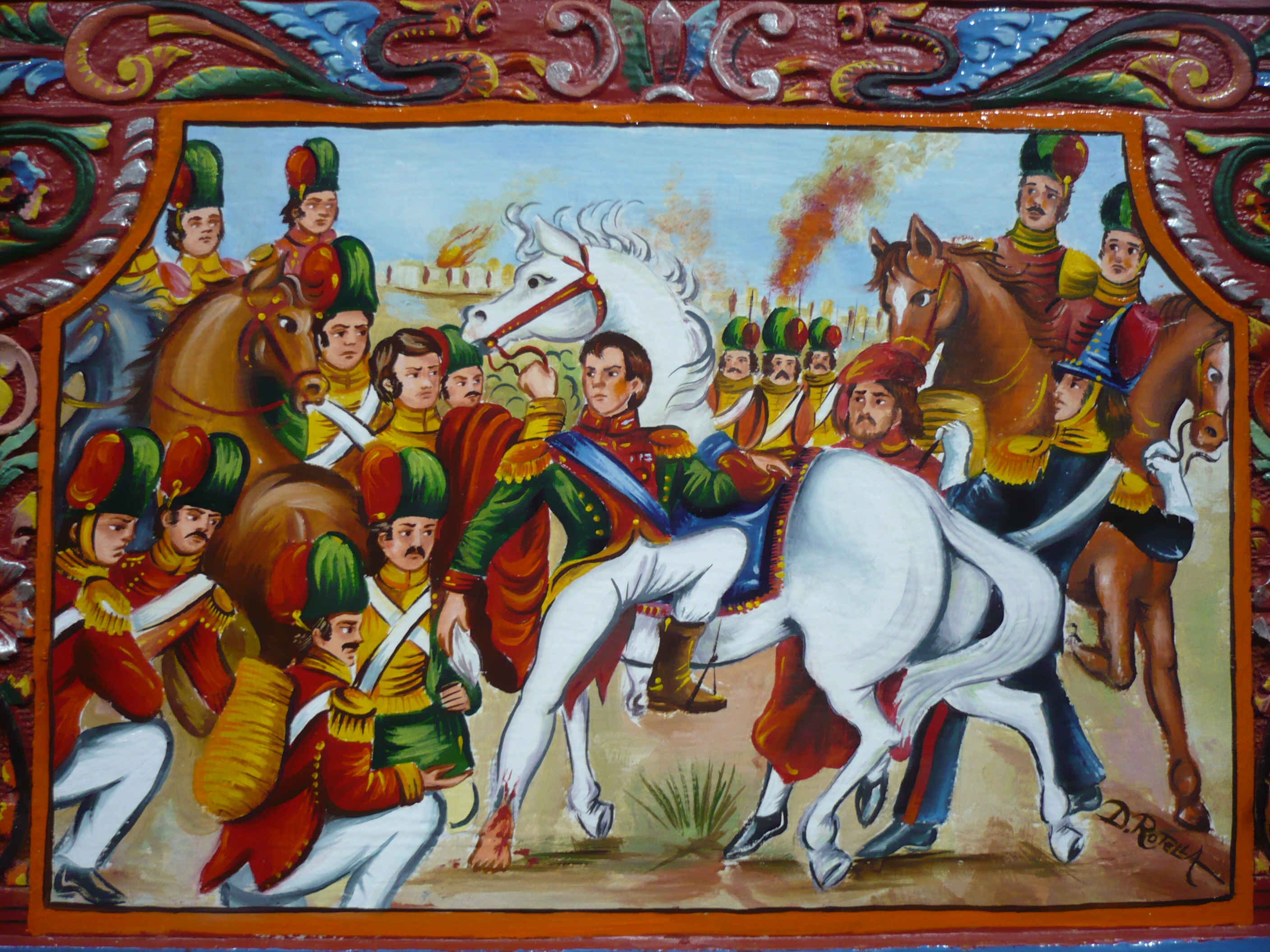 Sponda di carretto siciliano alla ragusana, rappresentante le gesta di Napoleone.